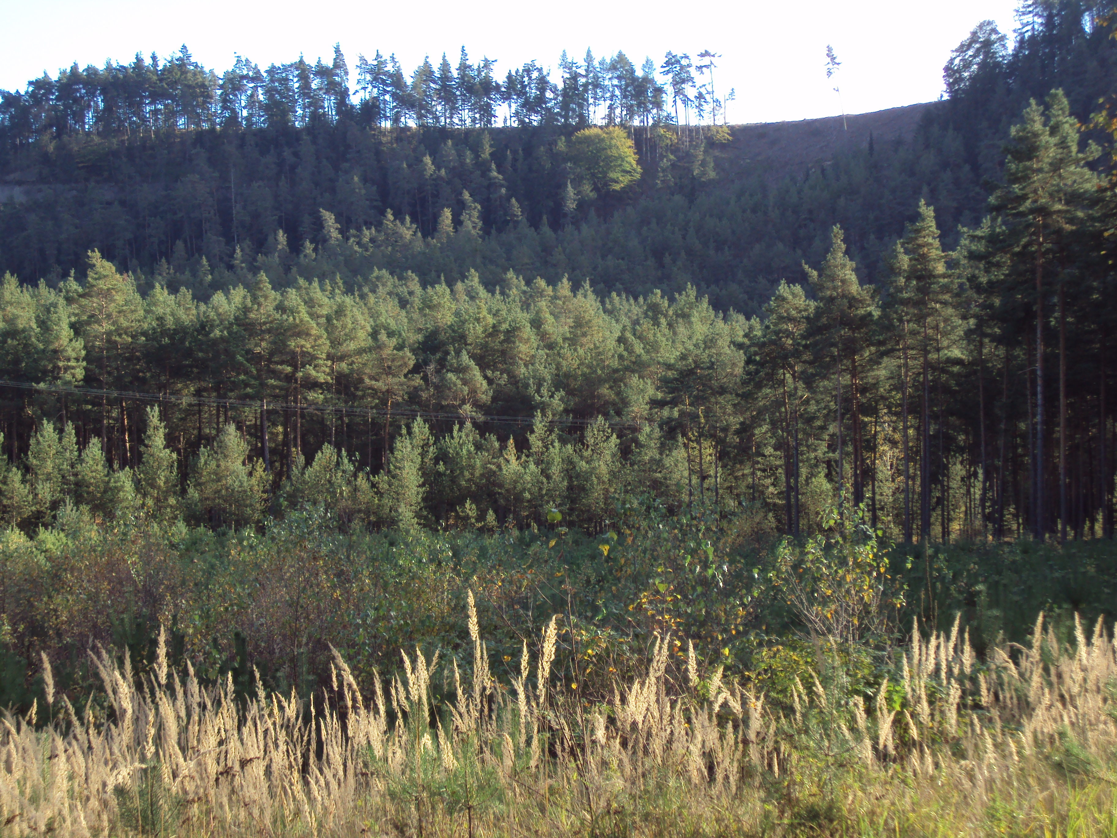 Přírodní památka Široký kámen 3 km JV od Hamr na Jezeře